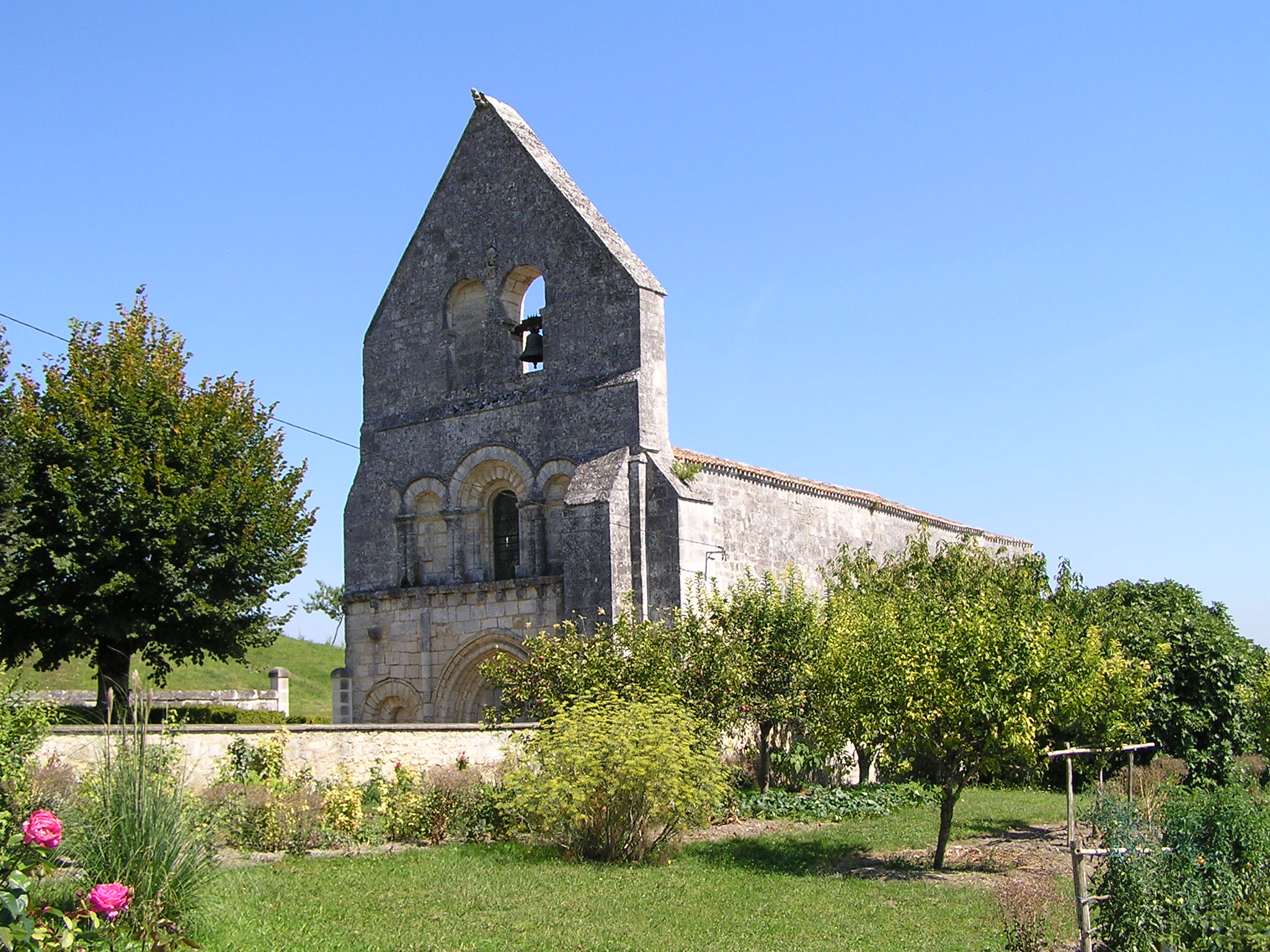 église d'Eraville, Charente, France